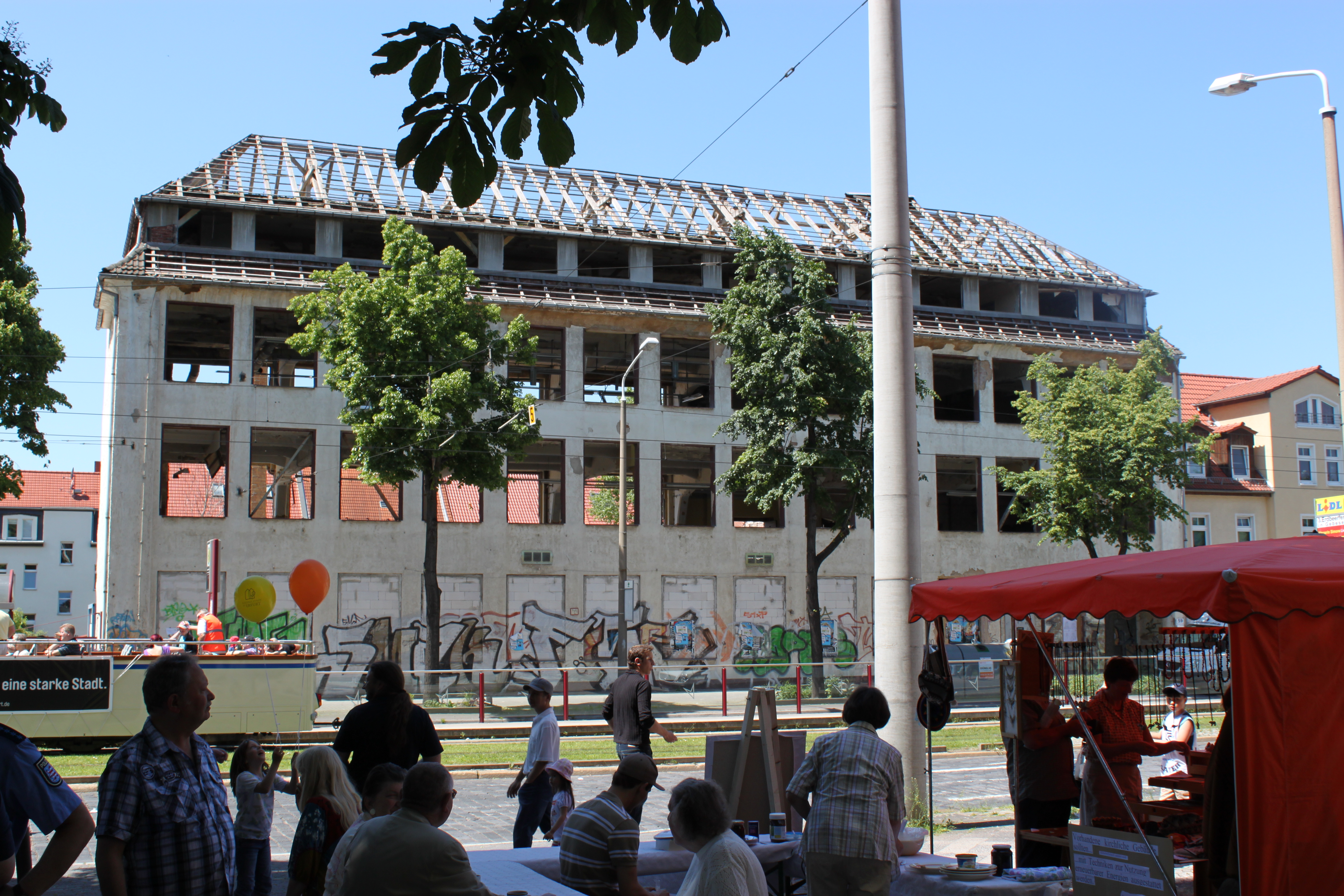 ehemalige Lingel-Fabrik, Abbruch im Jahr 2011